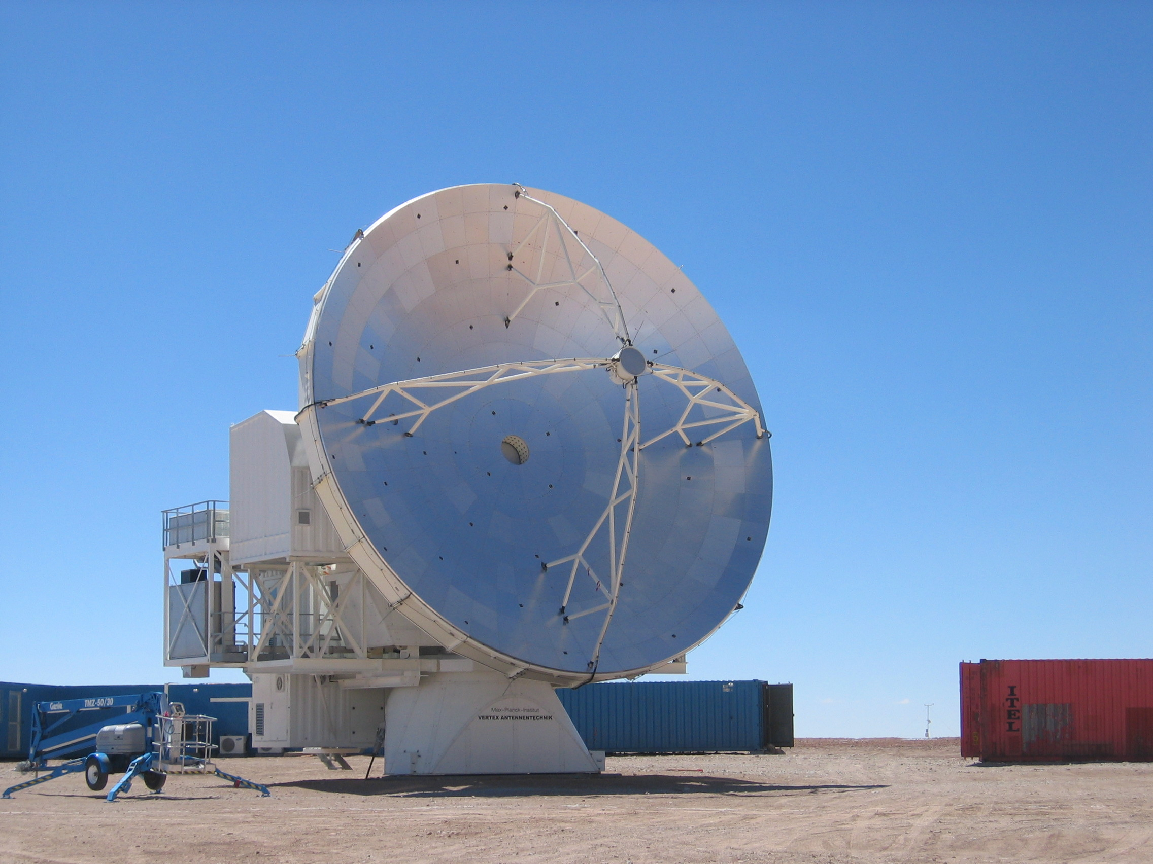 radiotélescope APEX sur le plateau de Chajnantor (5100 m) du projet ALMA.